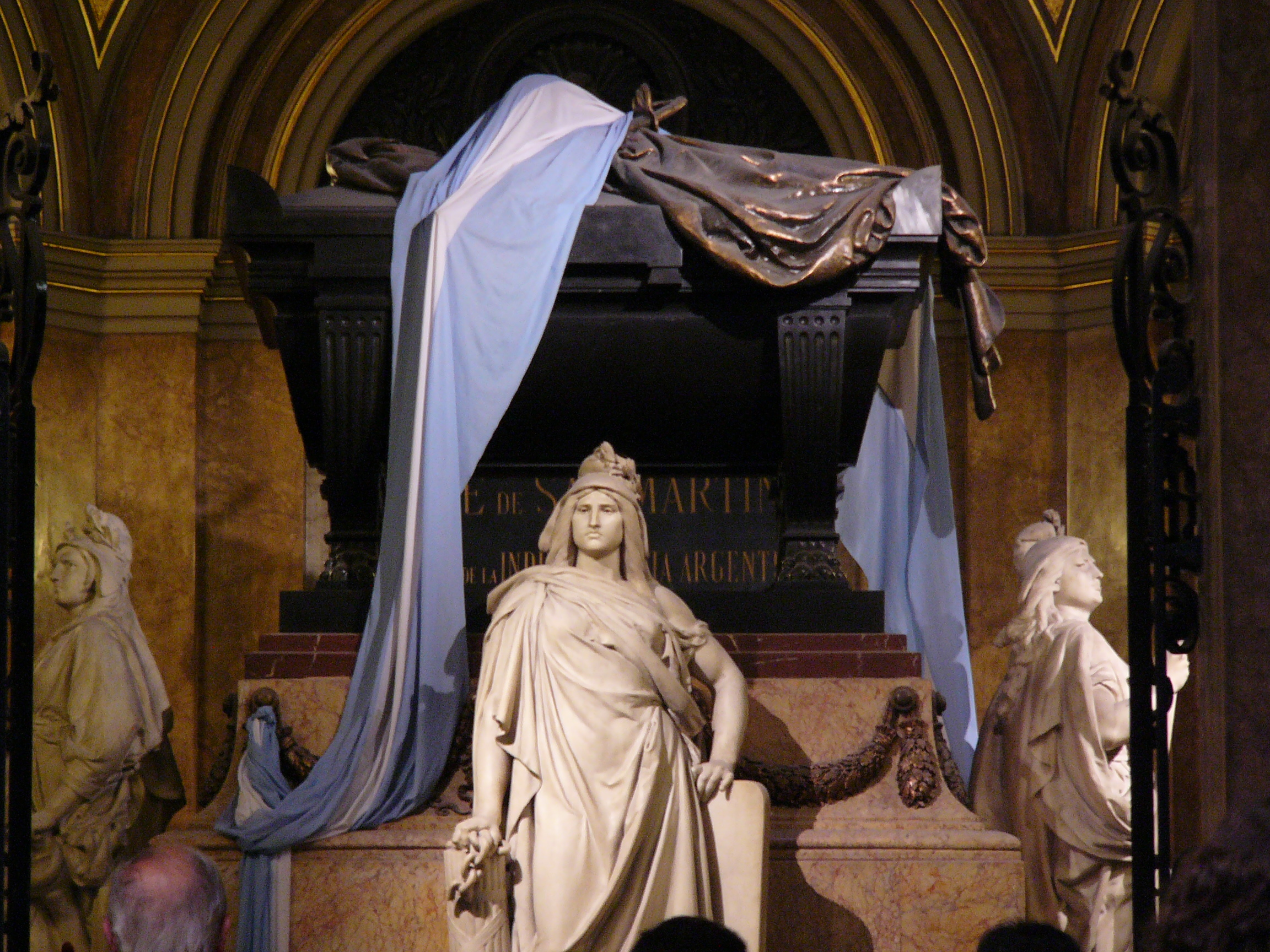 General José de San Martin mausoleum in Buenos Aires Cathedral